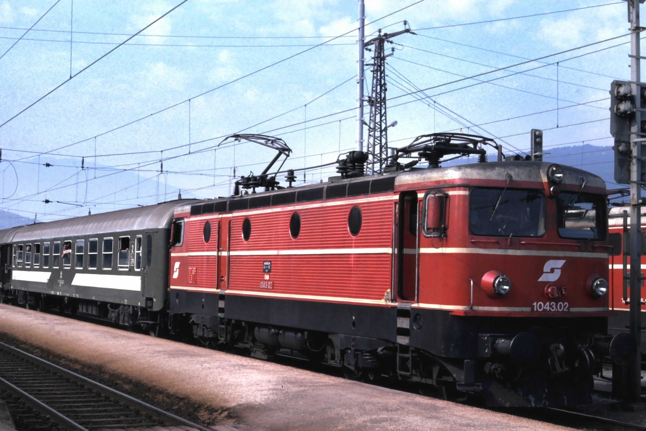 ÖBB 1043.02 in Villach-Westbahnhof